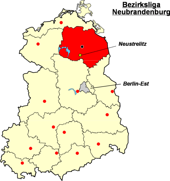 Localisation de Neutstrelitz dans la Bezirksliga Neubrandenburg Catégorie:Logo de clubs de football - Allemagne